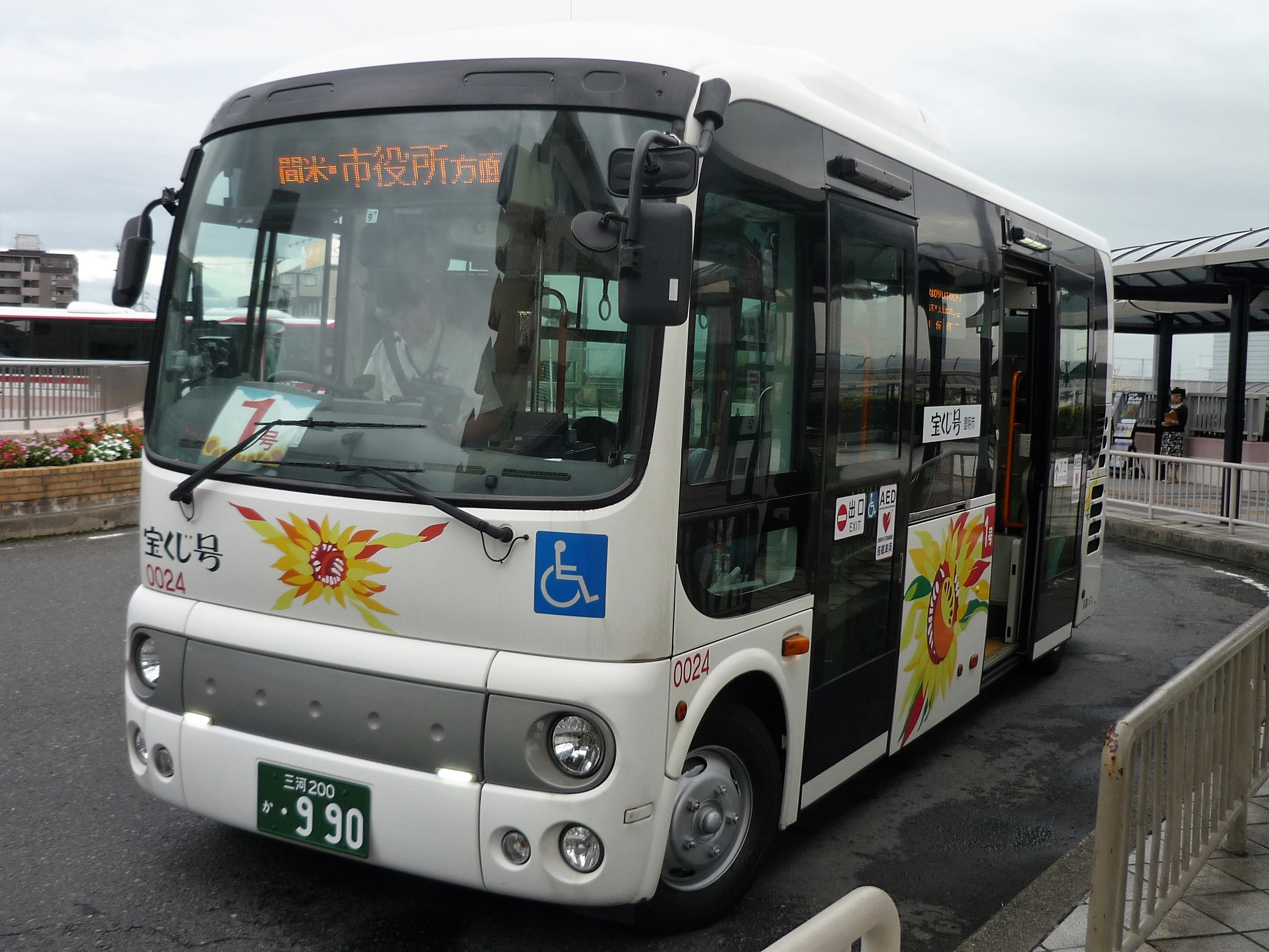 豊明市公共施設巡回バス「ひまわりバス」（前後駅にて） Panasonic Lumix DMC-FS3